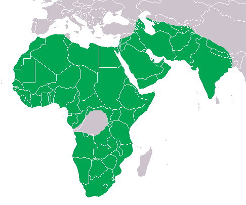 Hyaenidae, range map